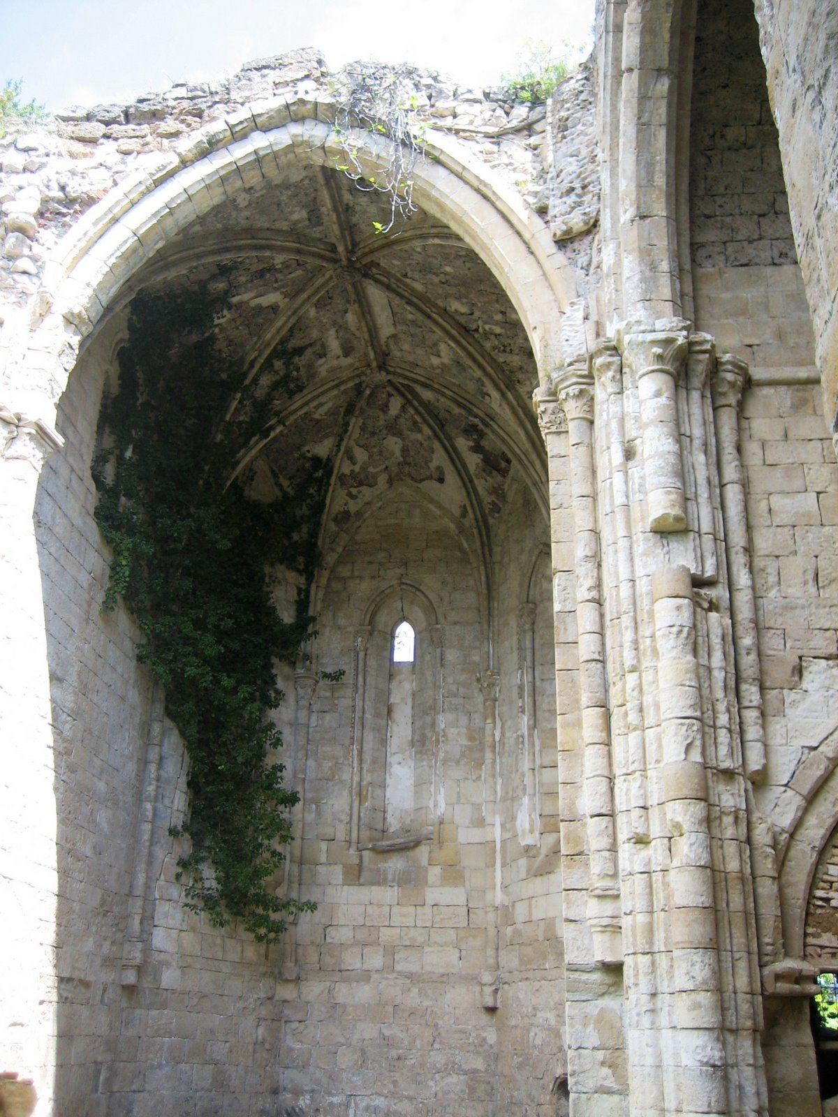 Monasterio de Bonaval situado en el municipio español de Retiendas (Guadalajara).